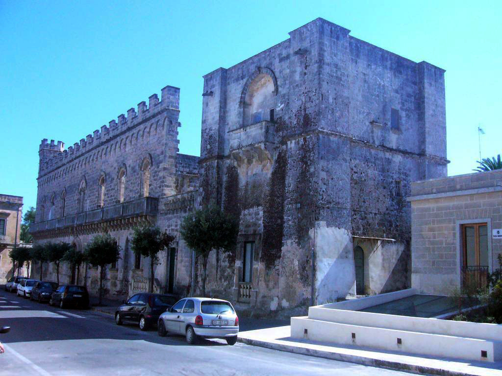 Marittima di Diso (Lecce) - Torre di Alfonso e Palazzo Baronale